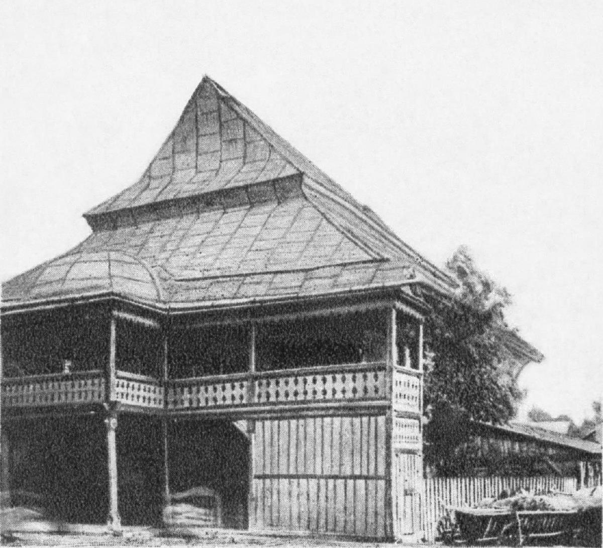 Дерев'яна синагога в Кам'янці-Бузькій.